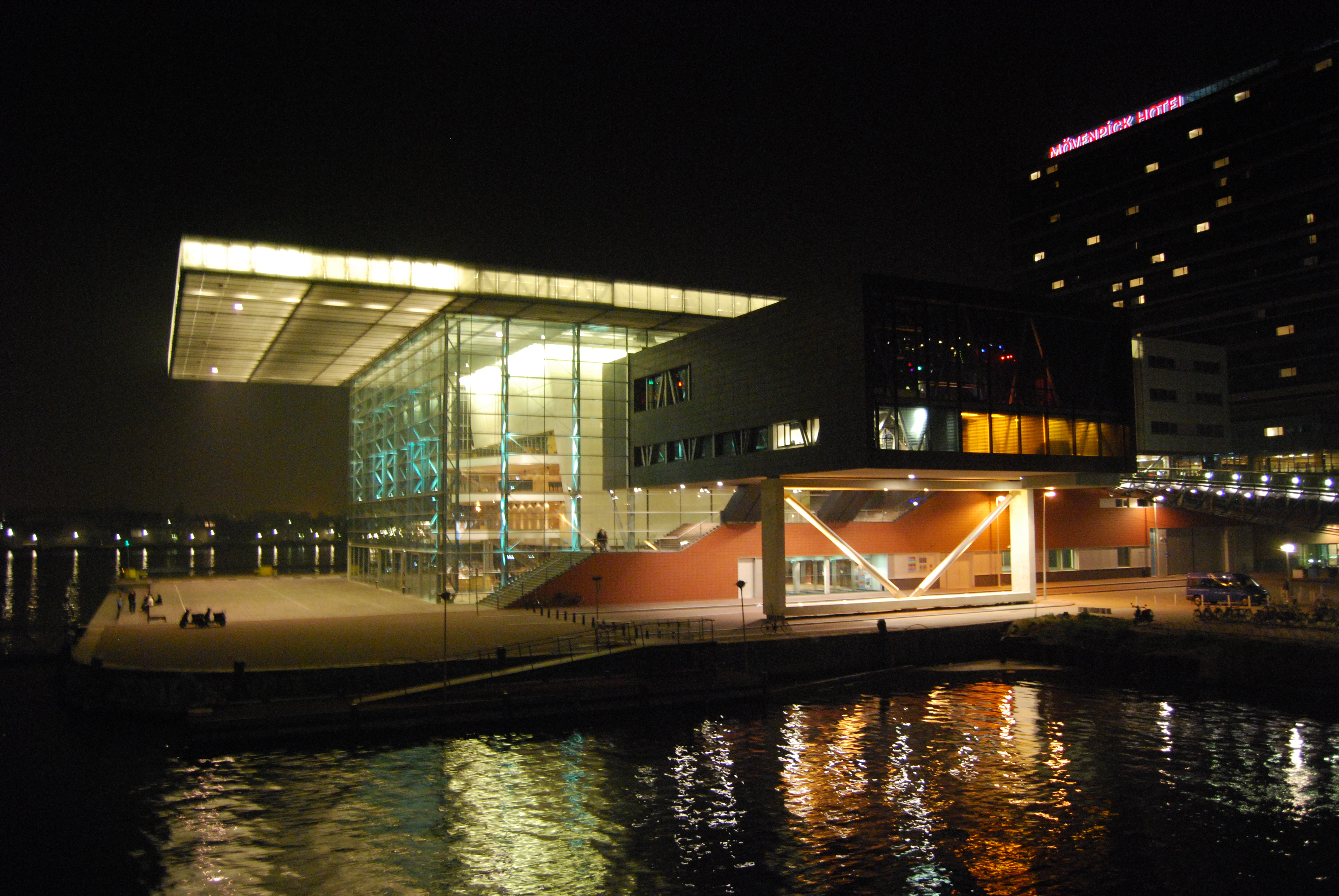 Muziekgebouw bij nacht